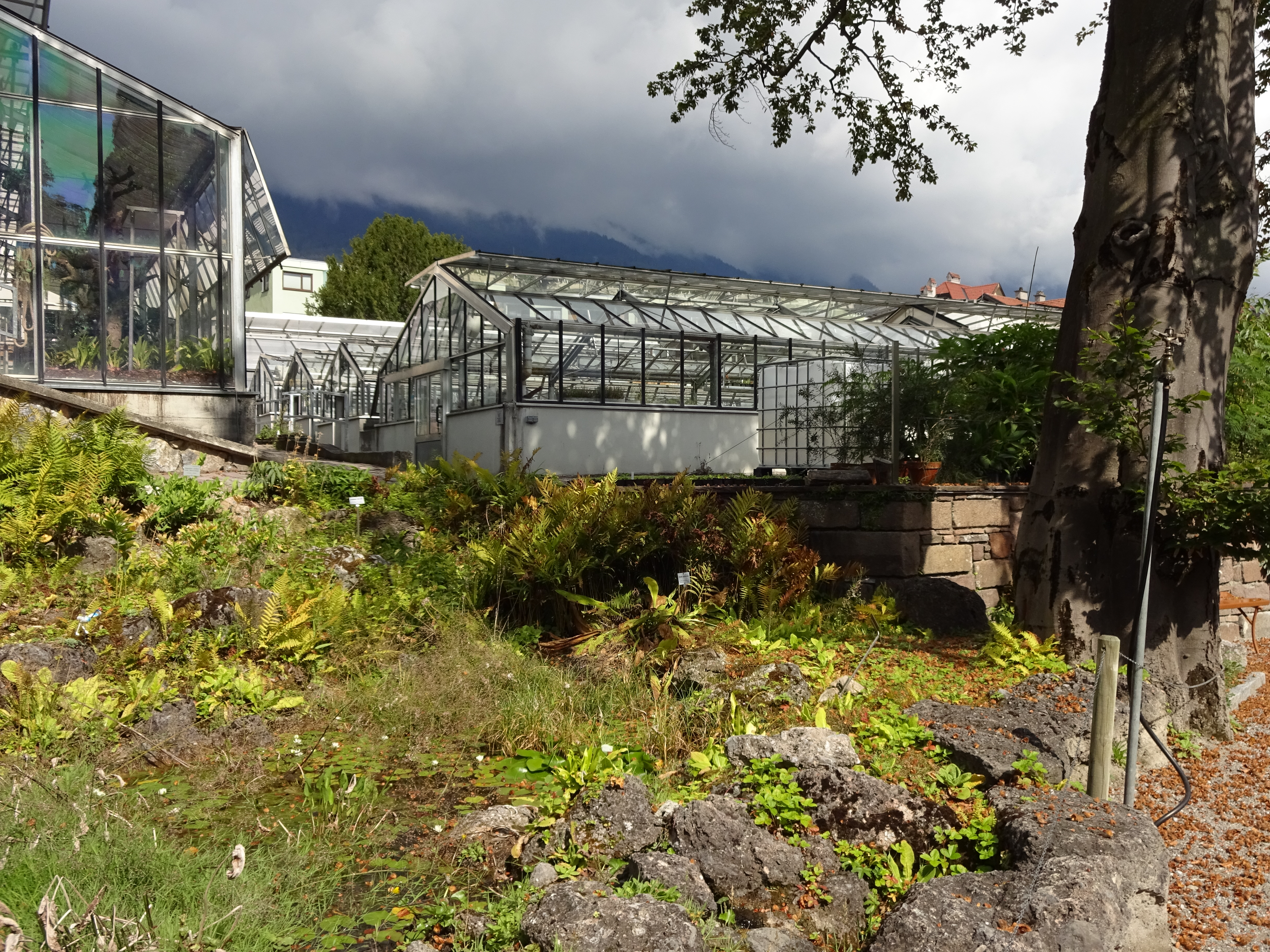 Botanischer Garten der Universität Innsbruck, Alpinum und Glashäuser